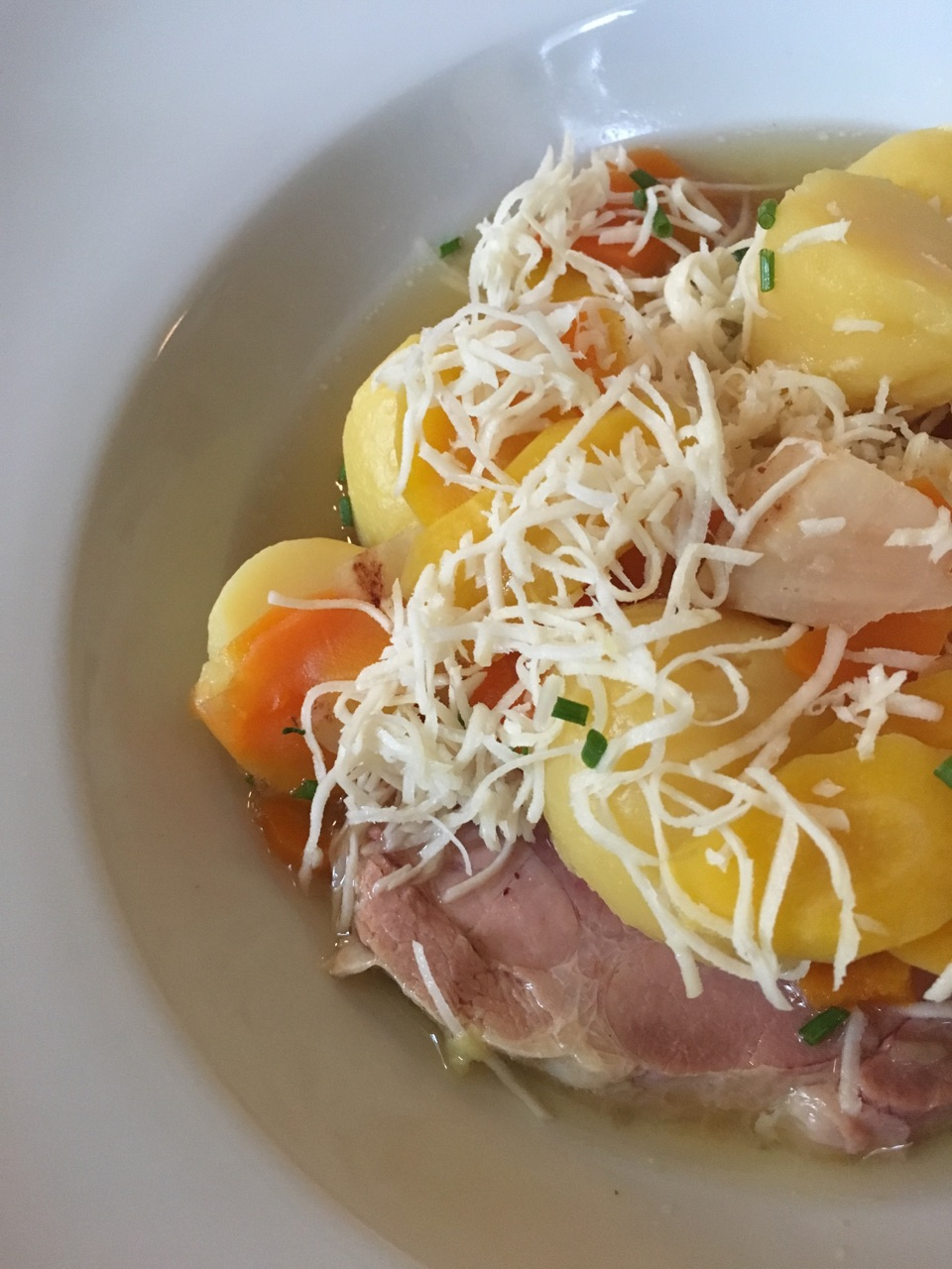 Steirisches Wurzelfleisch, Gasthaus Wickerl